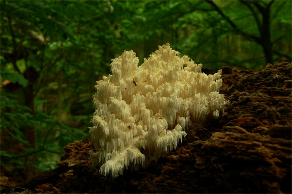 Ästiger Stachelbart (Hericium coralloides)